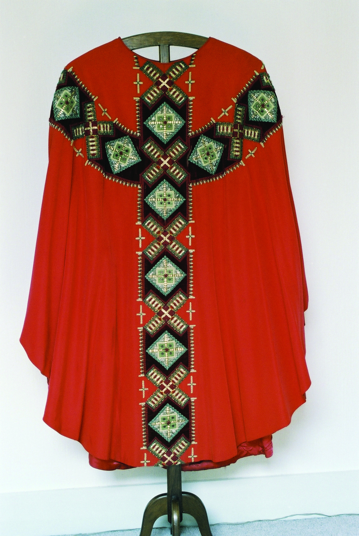 Kazuifel van het Hilversumse atelier J.L. Sträter, ca. 1960